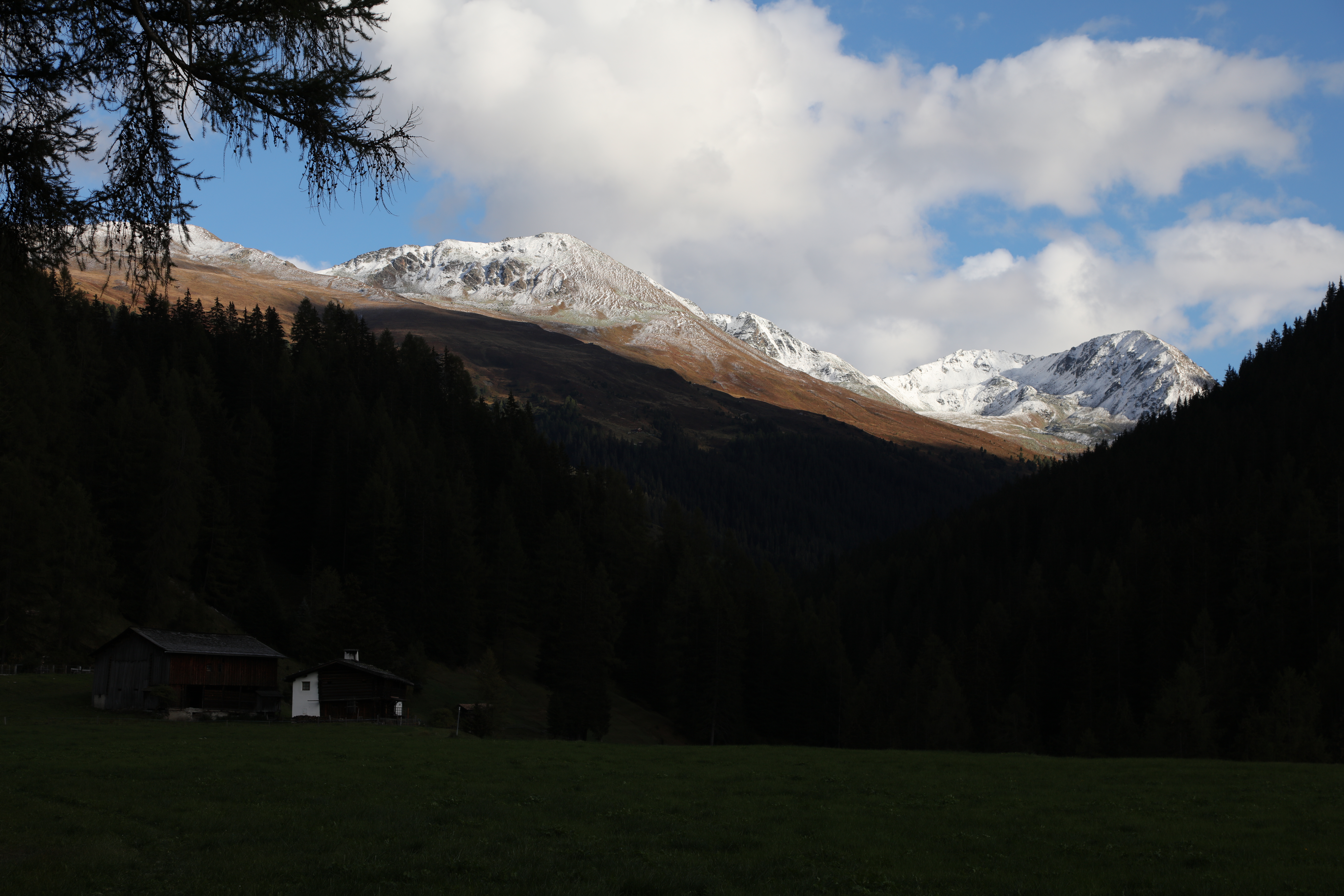 Der Bauernhof im Wildboden in Davos Frauenkirch. Das Wohnhaus wurde von 1923 zu seinem Tode 1938 von Ernst Ludwig Kirchner bewohnt.